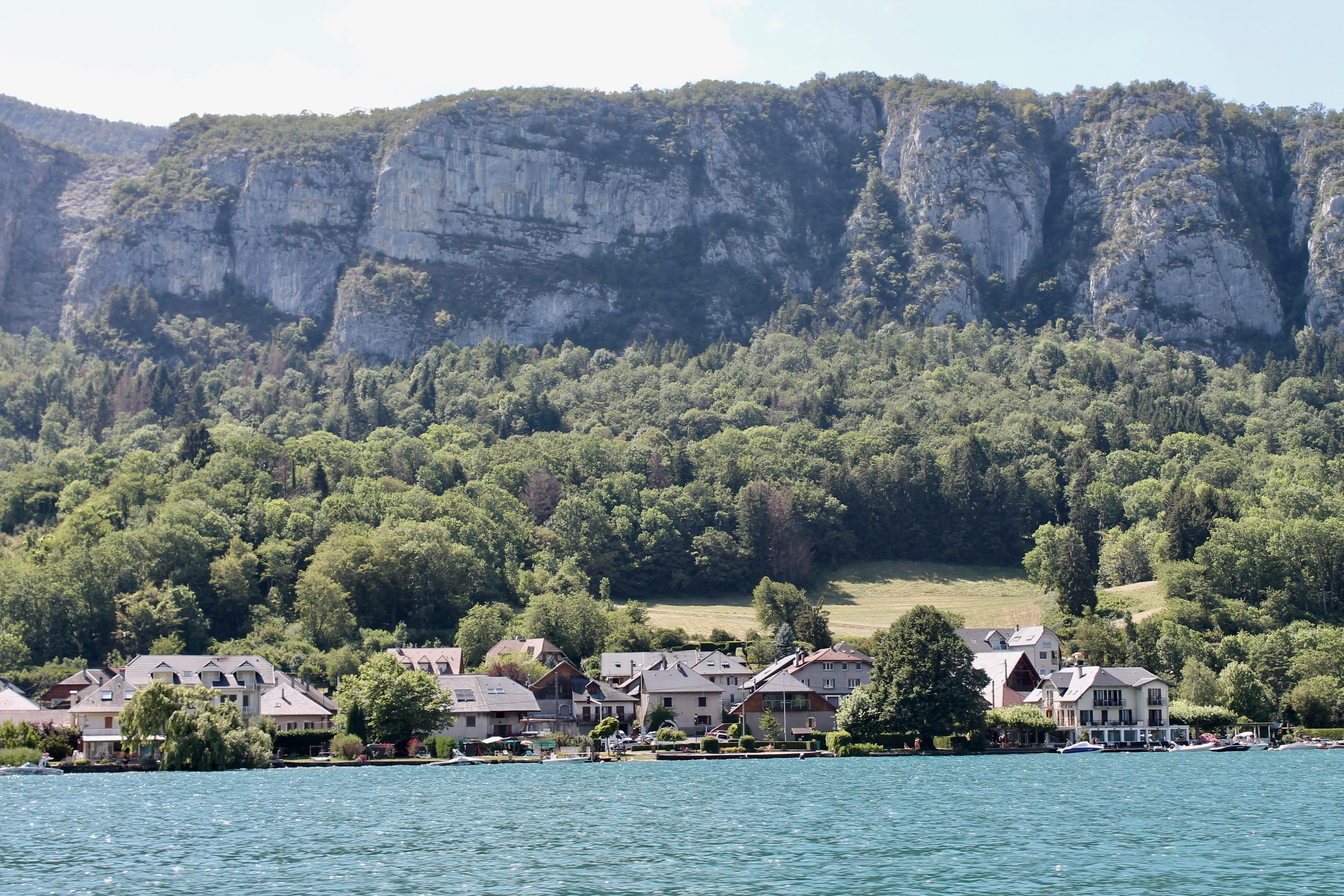 Village de Bredannaz depuis le lac (2019).